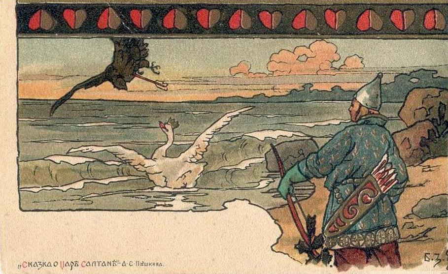 Почтовая открытка